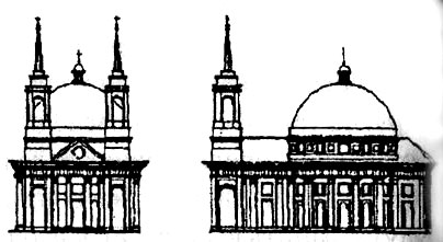 Беларуская (тарашкевіца): Чачэрск (Čačersk), вуліца Замкавая (vulica Zamkavaja). Царква Раства Багародзіцы